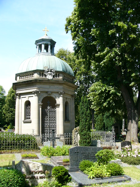 Grabmal des Alexander Friedrich Wilhelm von Württemberg auf dem Stadtfriedhof von Bayreuth